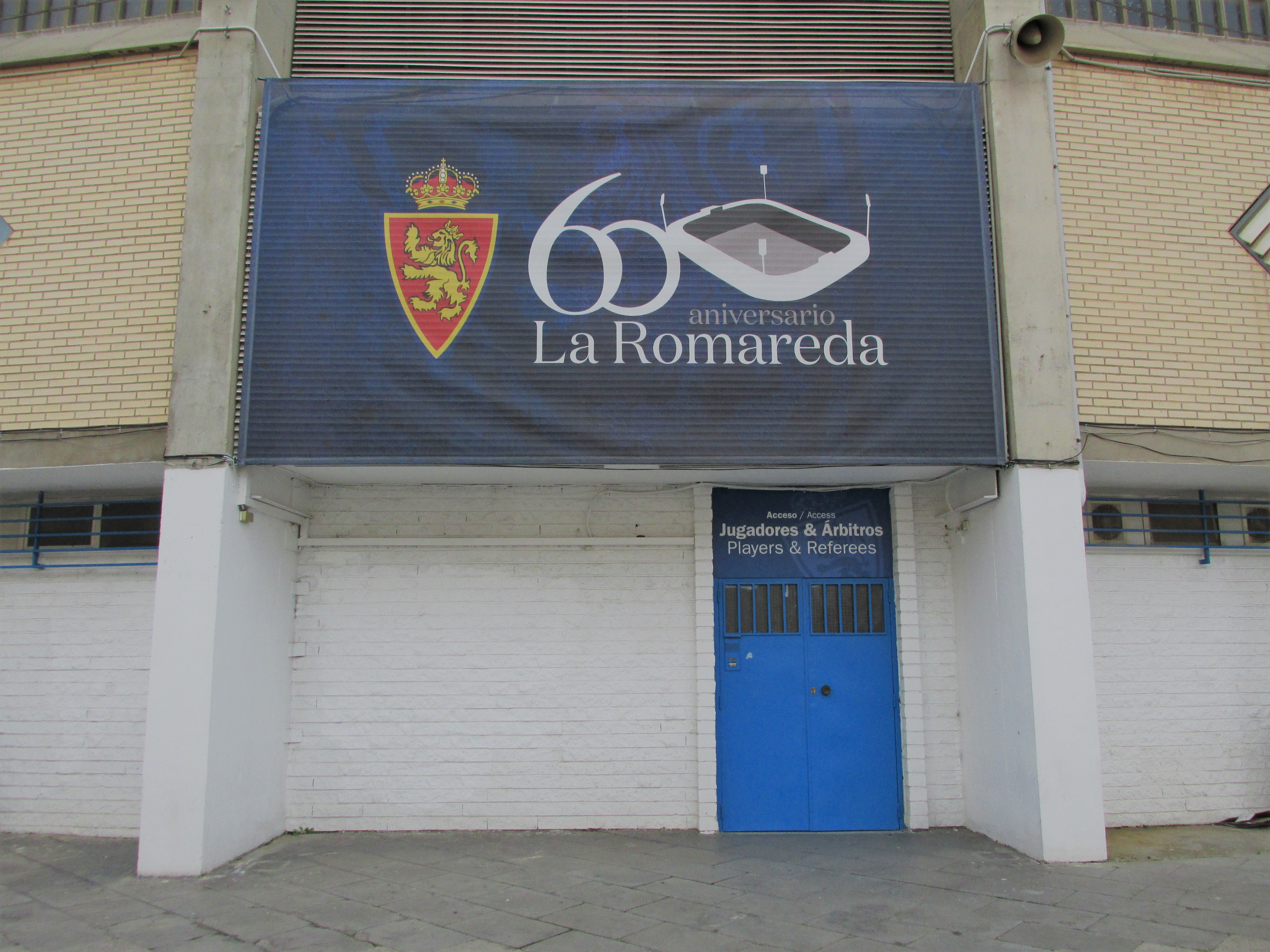 Banderola del LX Aniversario de La Romareda.